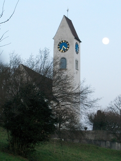 Kirchberg Küttigen, Kanton Aargau, Schweiz